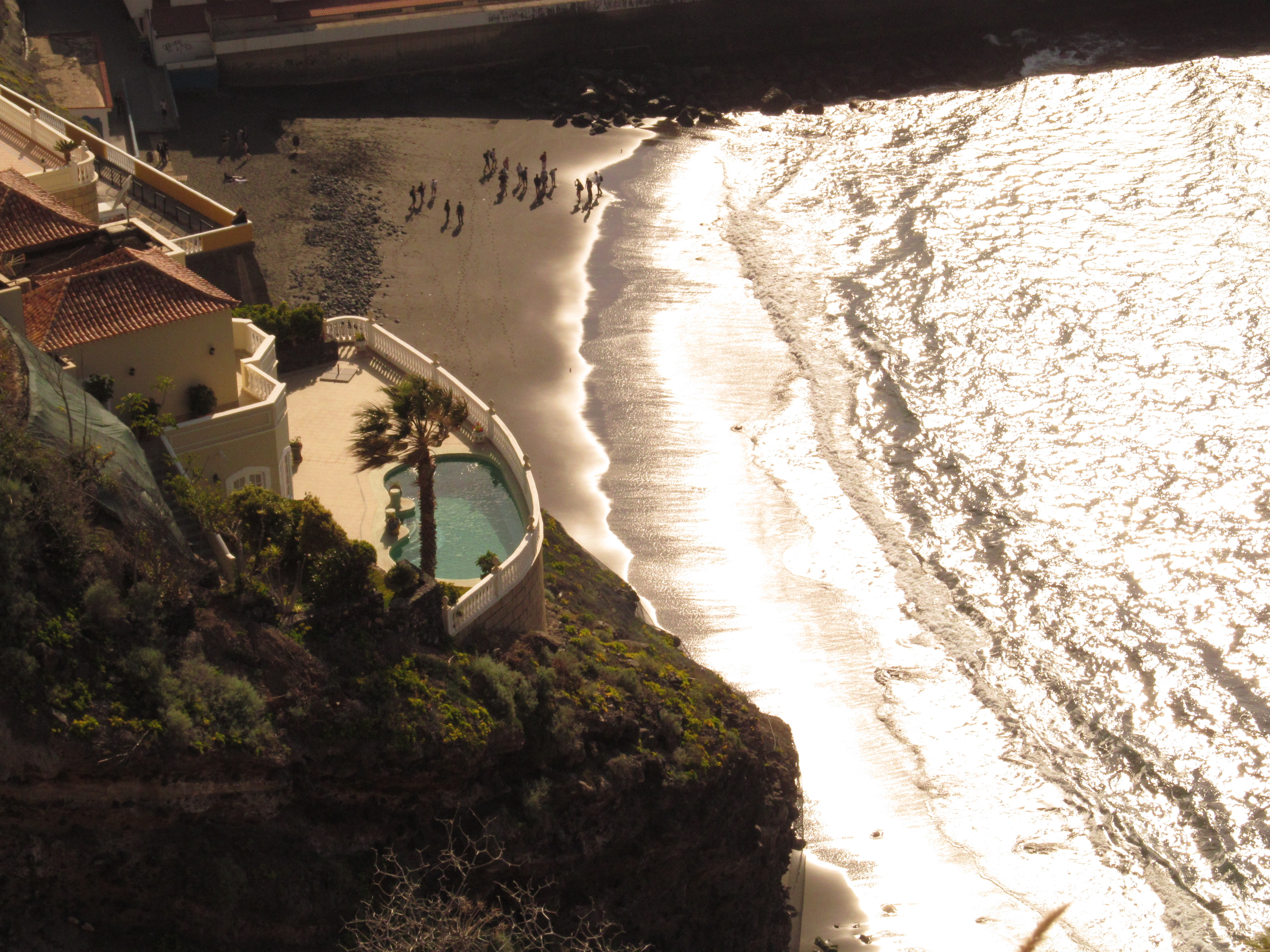 Nadar